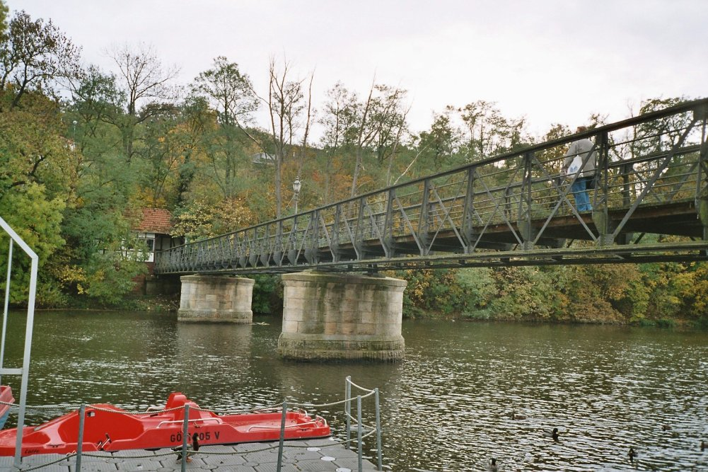 Die Zweipfennigbrücke in Melsungen, eigenes Bild